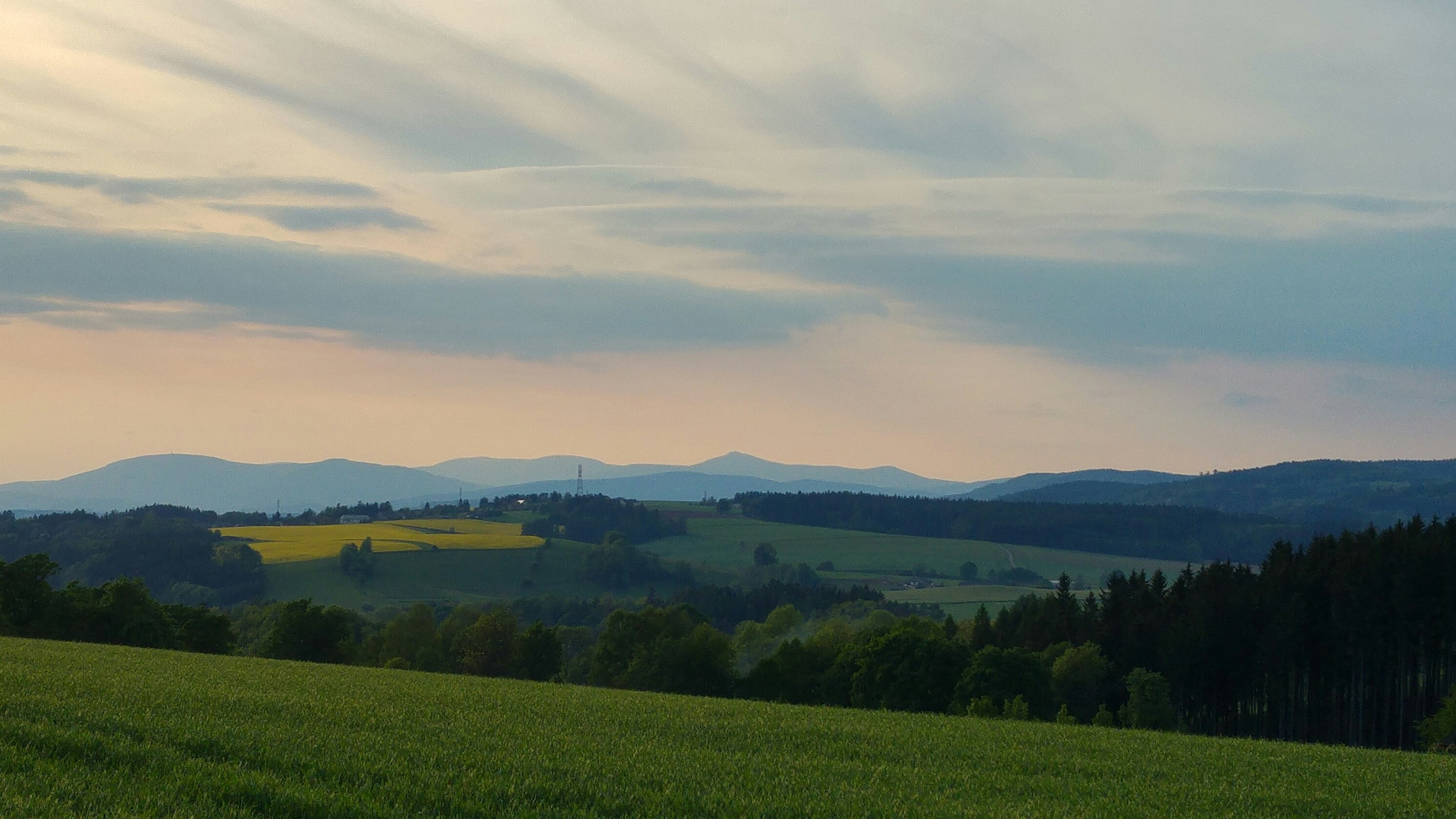 Západní část Červenokostelecké pahorkatiny